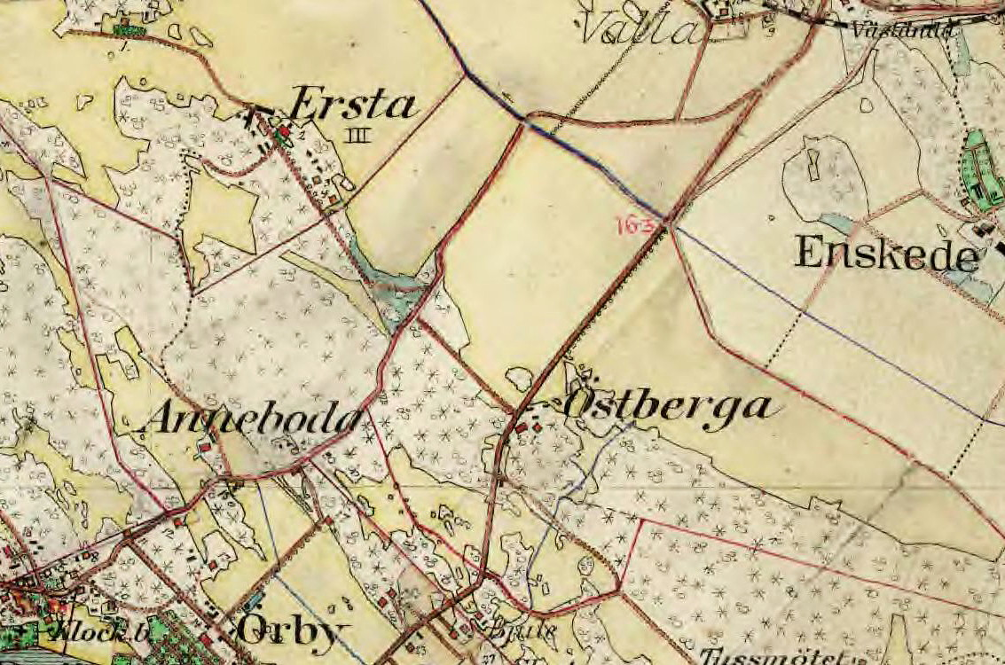 Östberga gård med omgivning